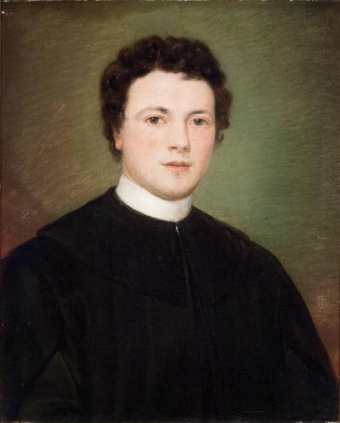 Ambito culturale: ambito lombardo.